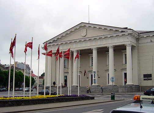 Foto på rådhuset i Vilnius, tagen av mig själv 2005.